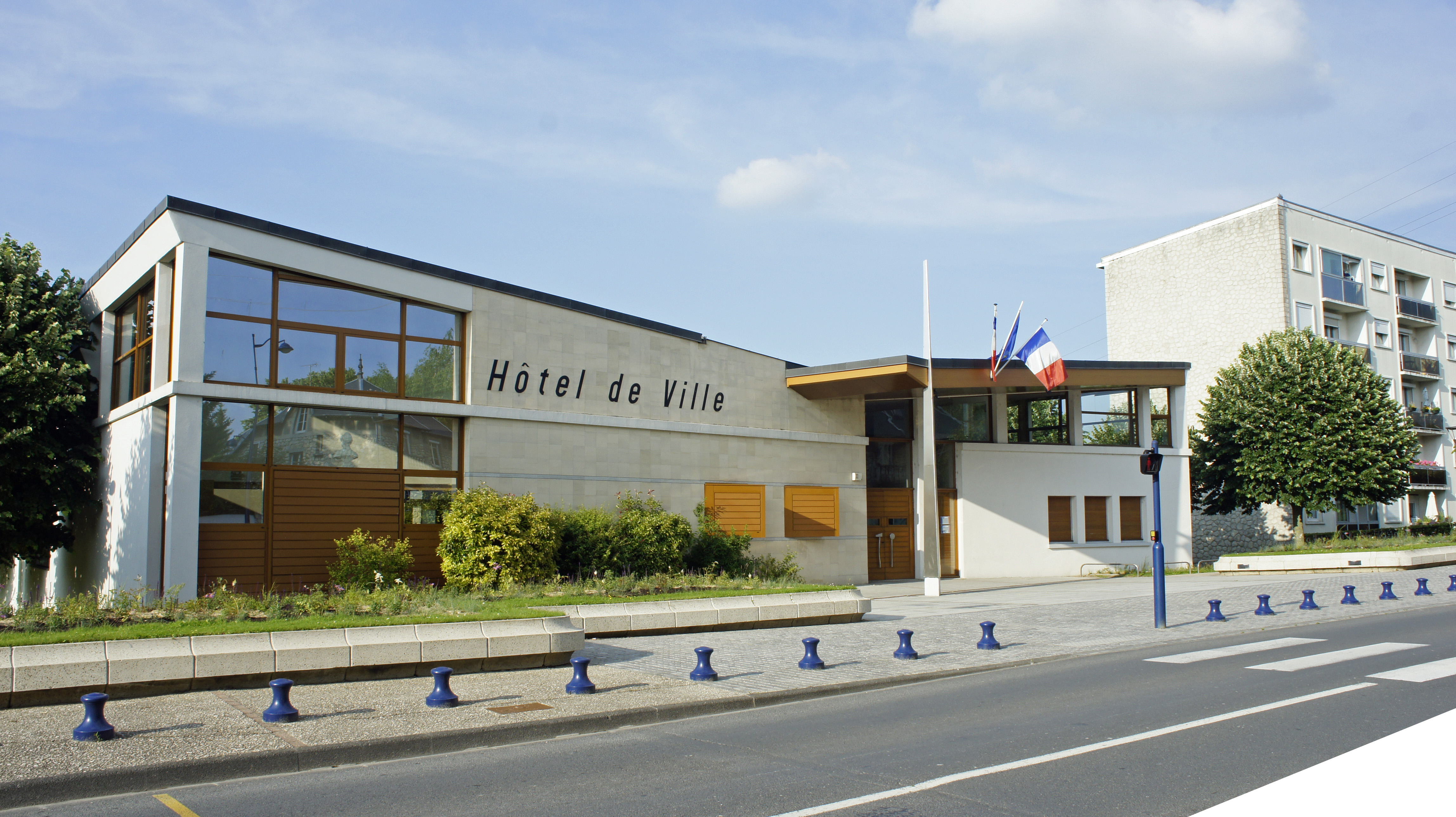 Vue de la mairie depuis la rue principale.